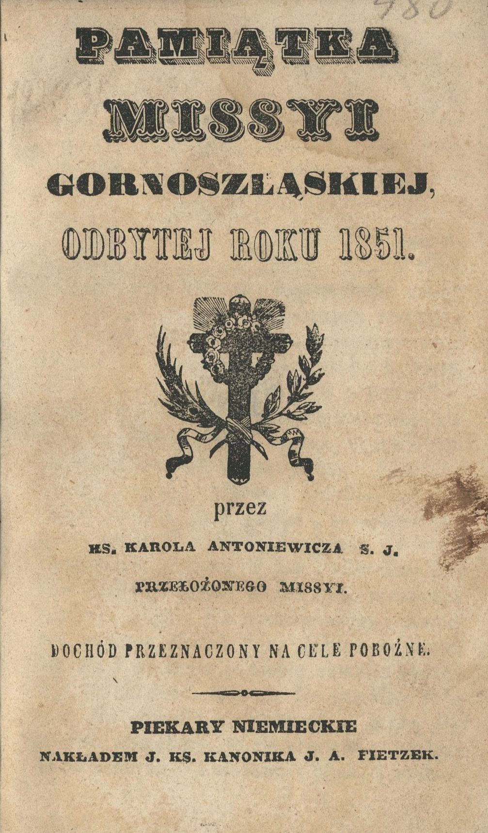 Karta tytułowa druku Pamiątka missyi górnoszląskiej ks. Karola Antoniewicza z 1851 r.